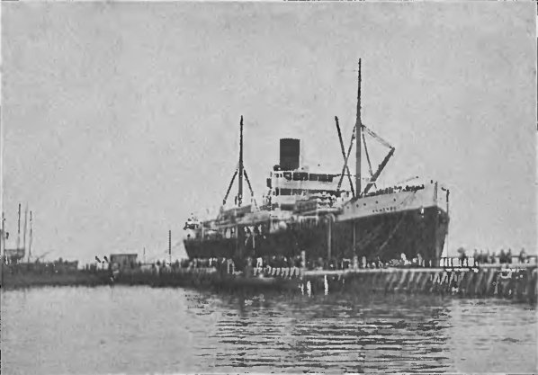 SS Kentucky to francuski niewielki parowy statek pasażerski o tonażu 7000 ton. Pierwszy pełnomorski statek zagraniczny jaki przybył do portu Gdynia.